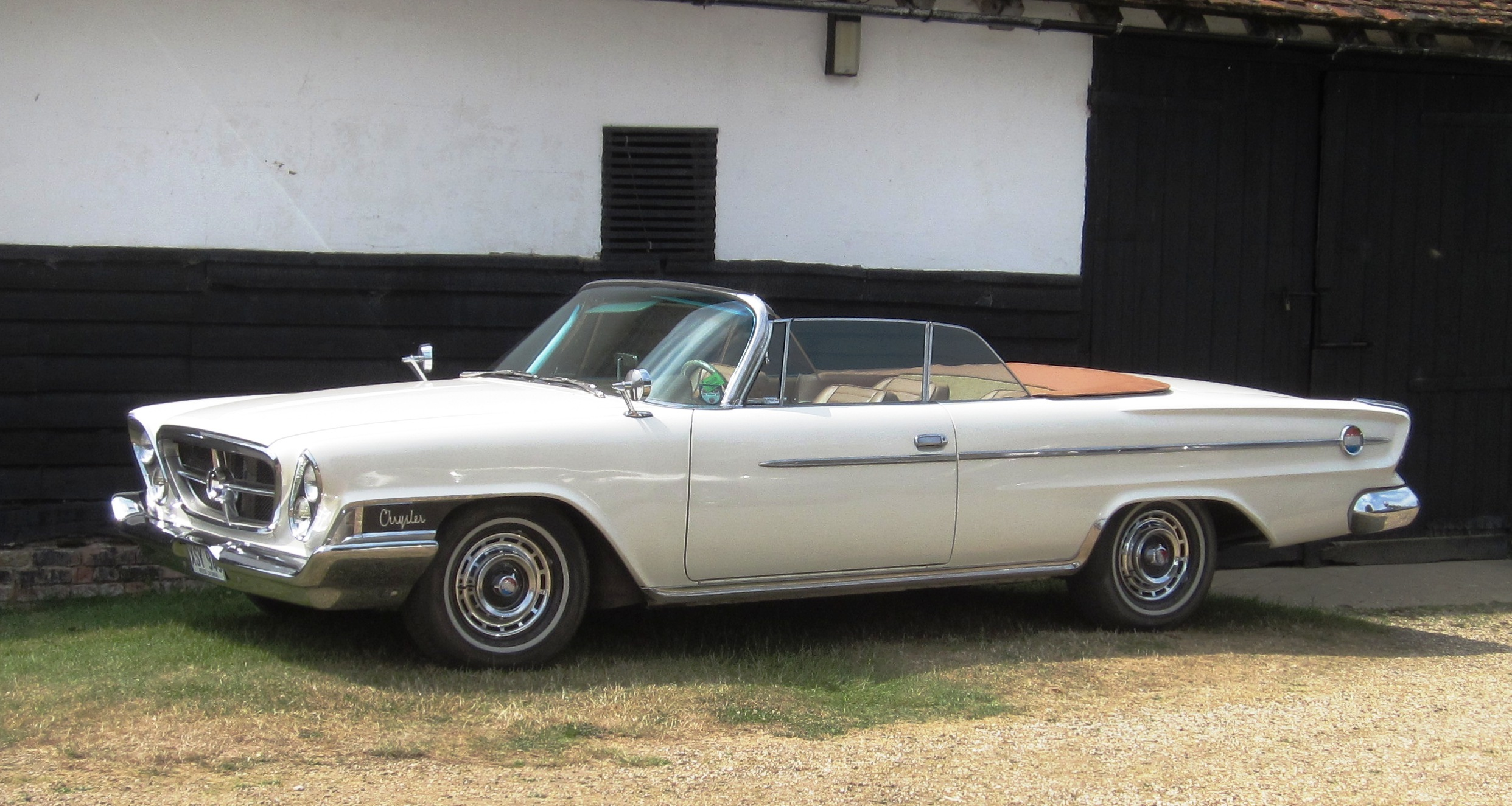 Chrysler 300H cabriolet (1962)